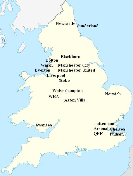 Norsk (bokmål): Bilde av hva by de engelske lagene i Premier League 2011-12 sesongen kommer fra.